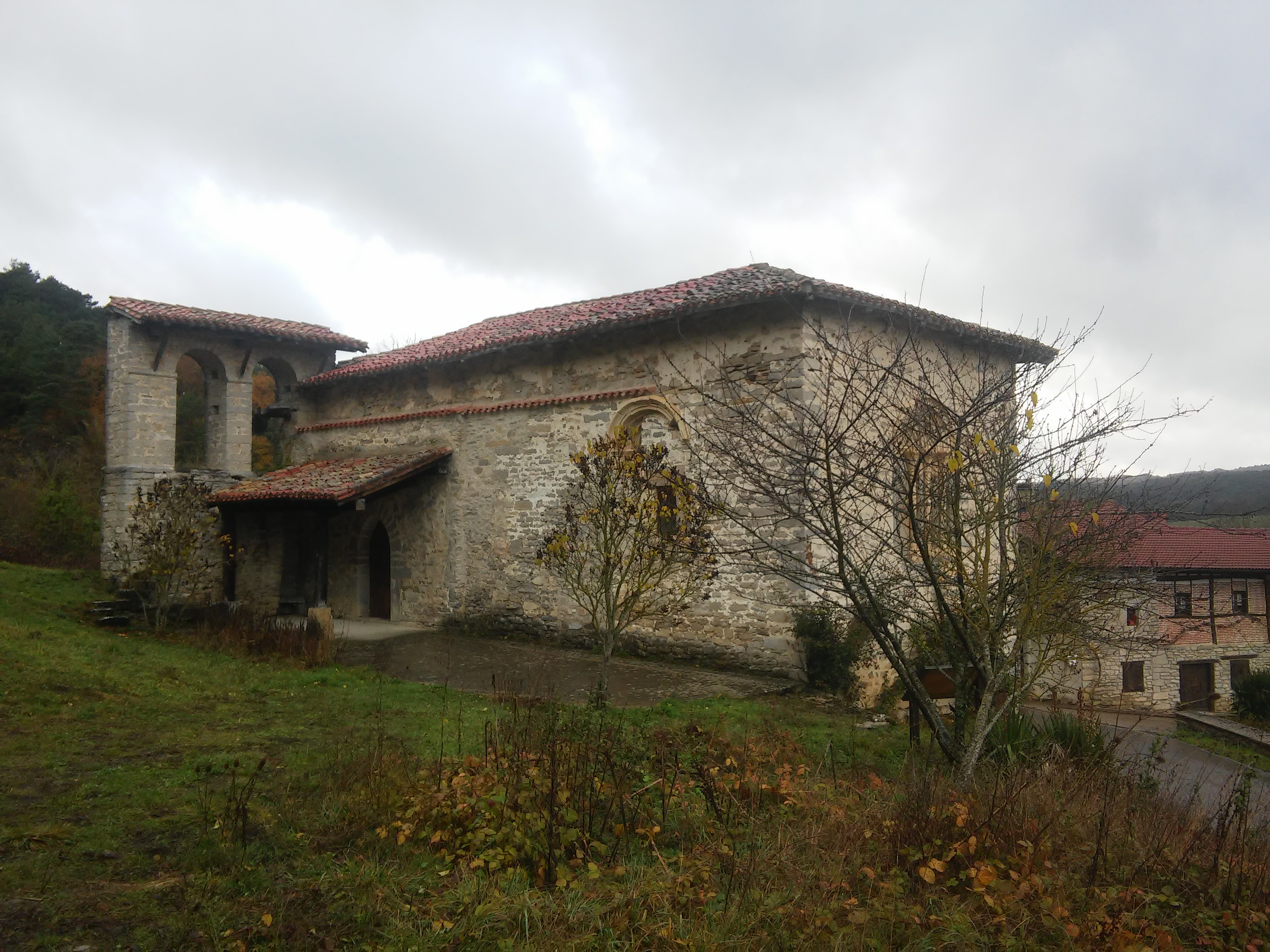 Villamanca herriko (Kuartango, Araba) eliza